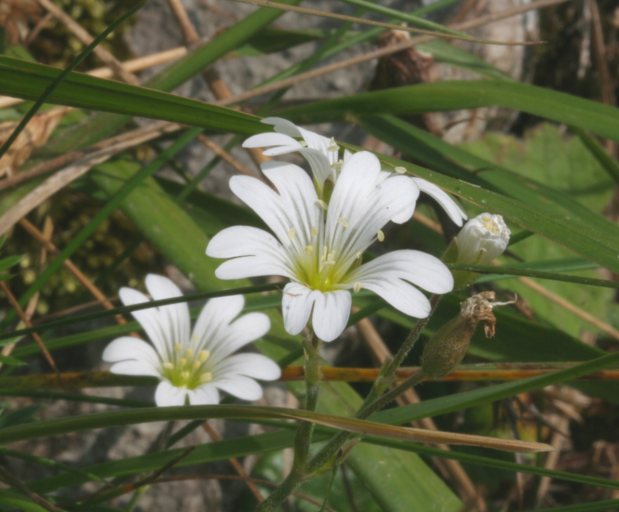 Cerastium alpinum (Peverina alpina)